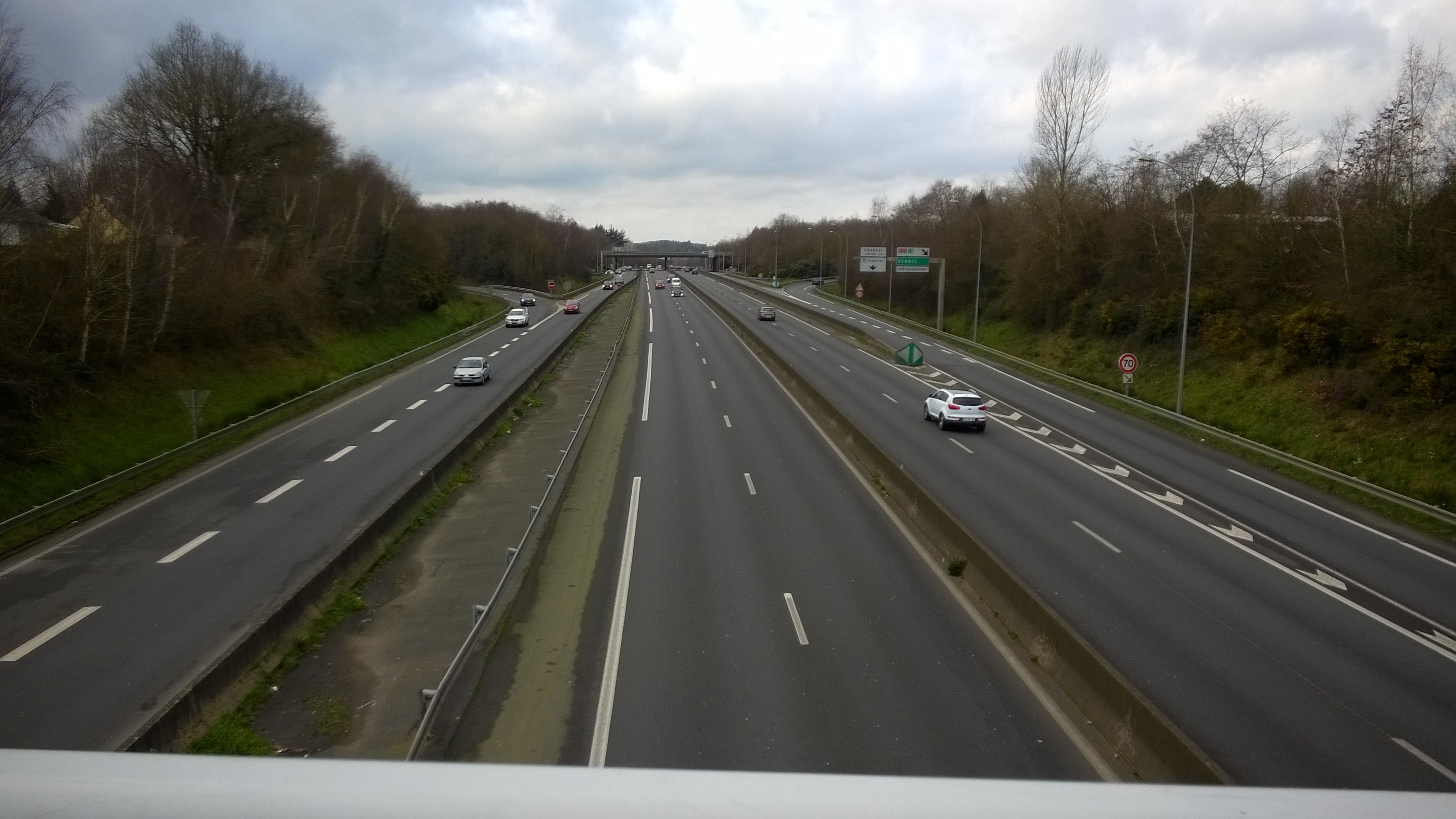 Périphérique nord de Nantes (photographie prise d'un pont).